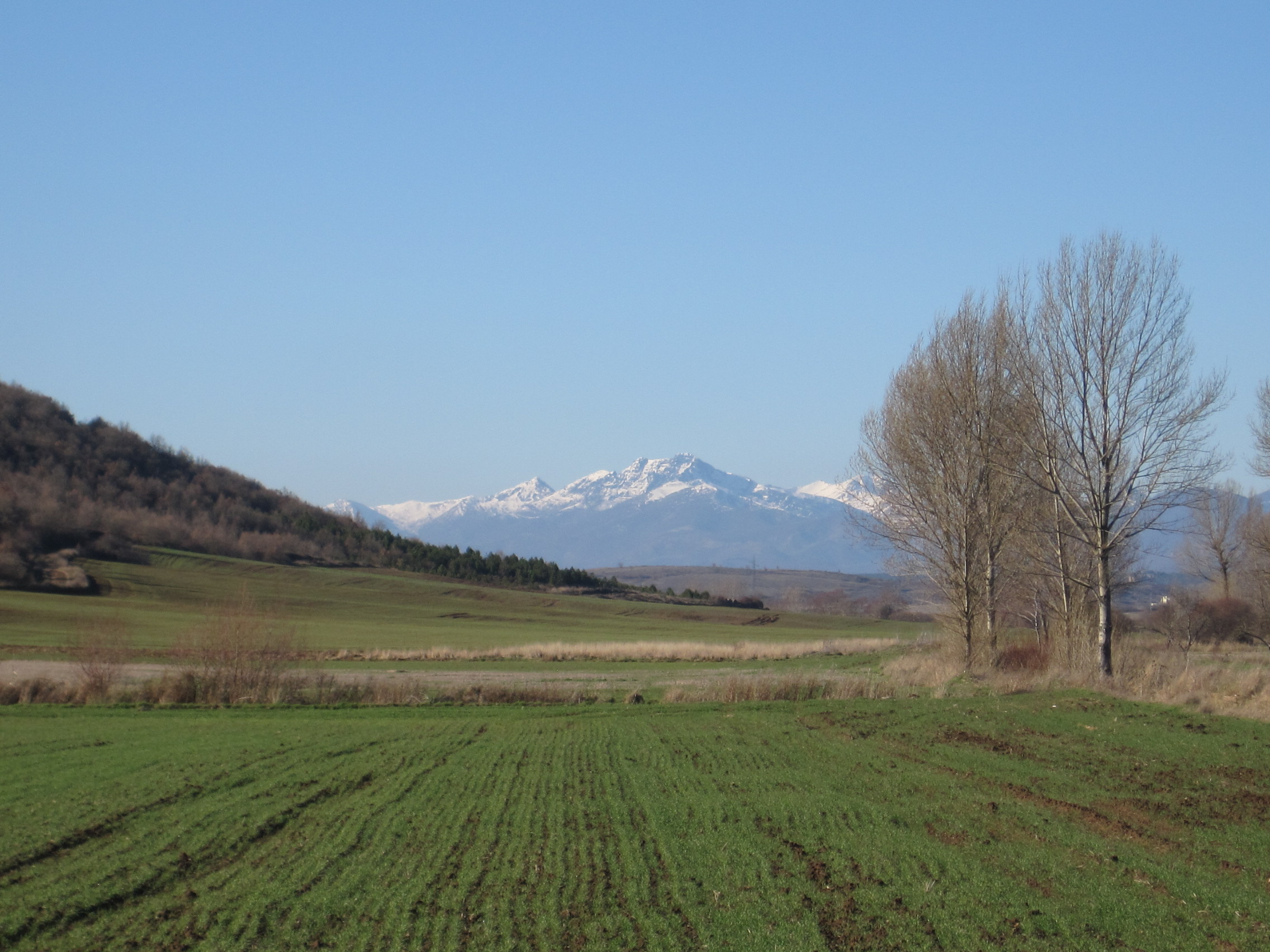 Vista del pico Curavacas desde la localidad de Puentetoma (Aguilar de Campoo, Palencia, España). A su izquierda asoma el pico Hoya Continua.